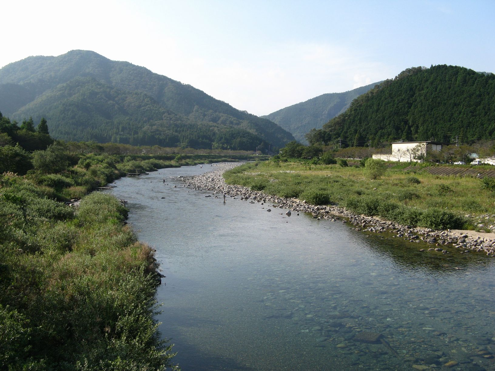 板取川 睦橋から上流方を望む